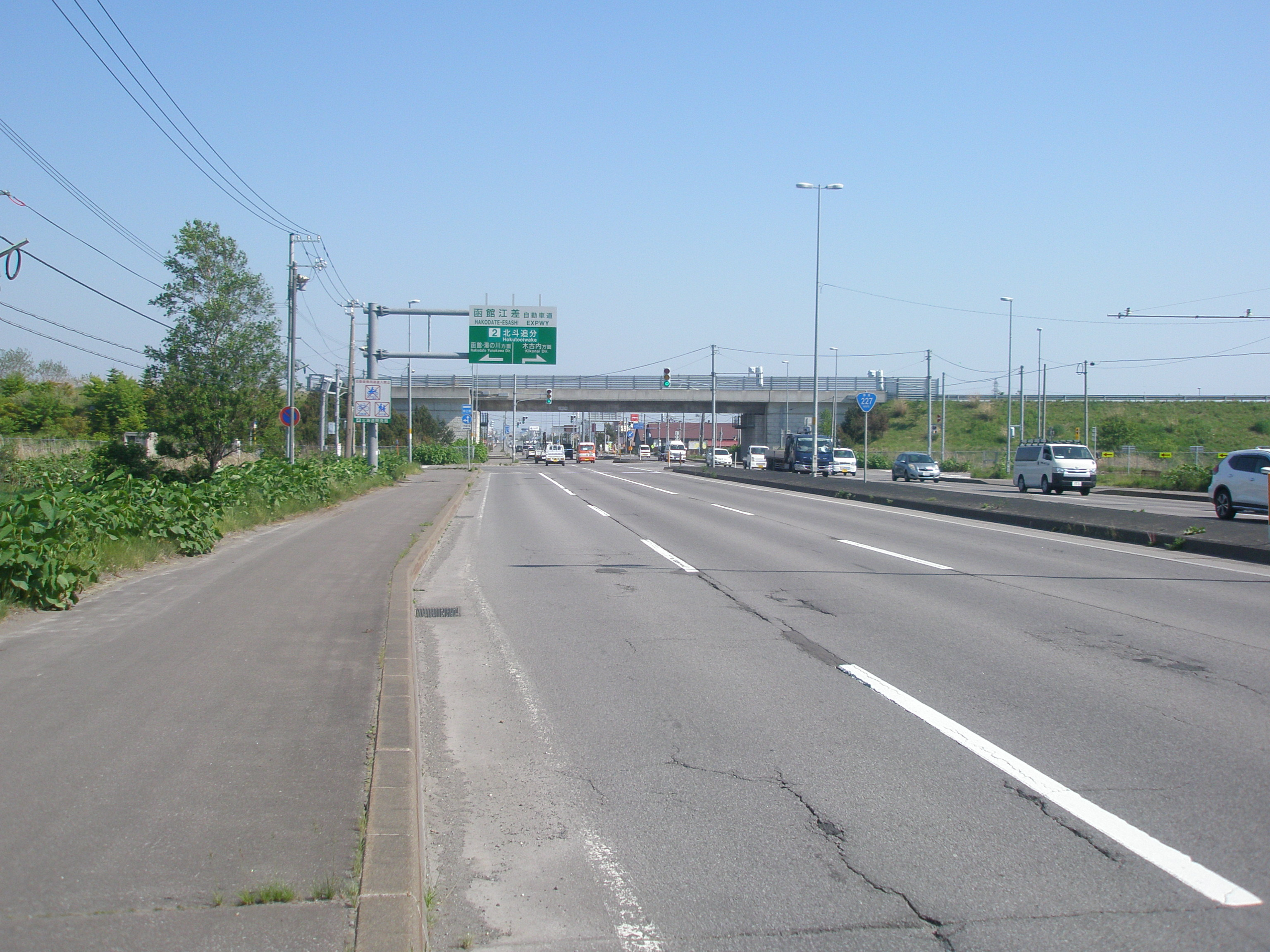 北斗追分インターチェンジ-2（国道227号・終点（江差）側から、2019年5月撮影）北海道道1164号北斗追分インター線との間接接続だが、未開通のため実質の直接接続となっている